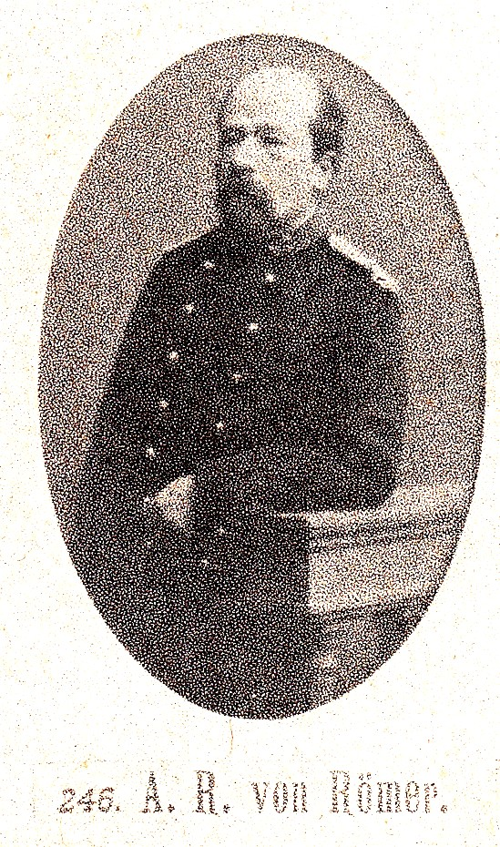 A.R. von Romer